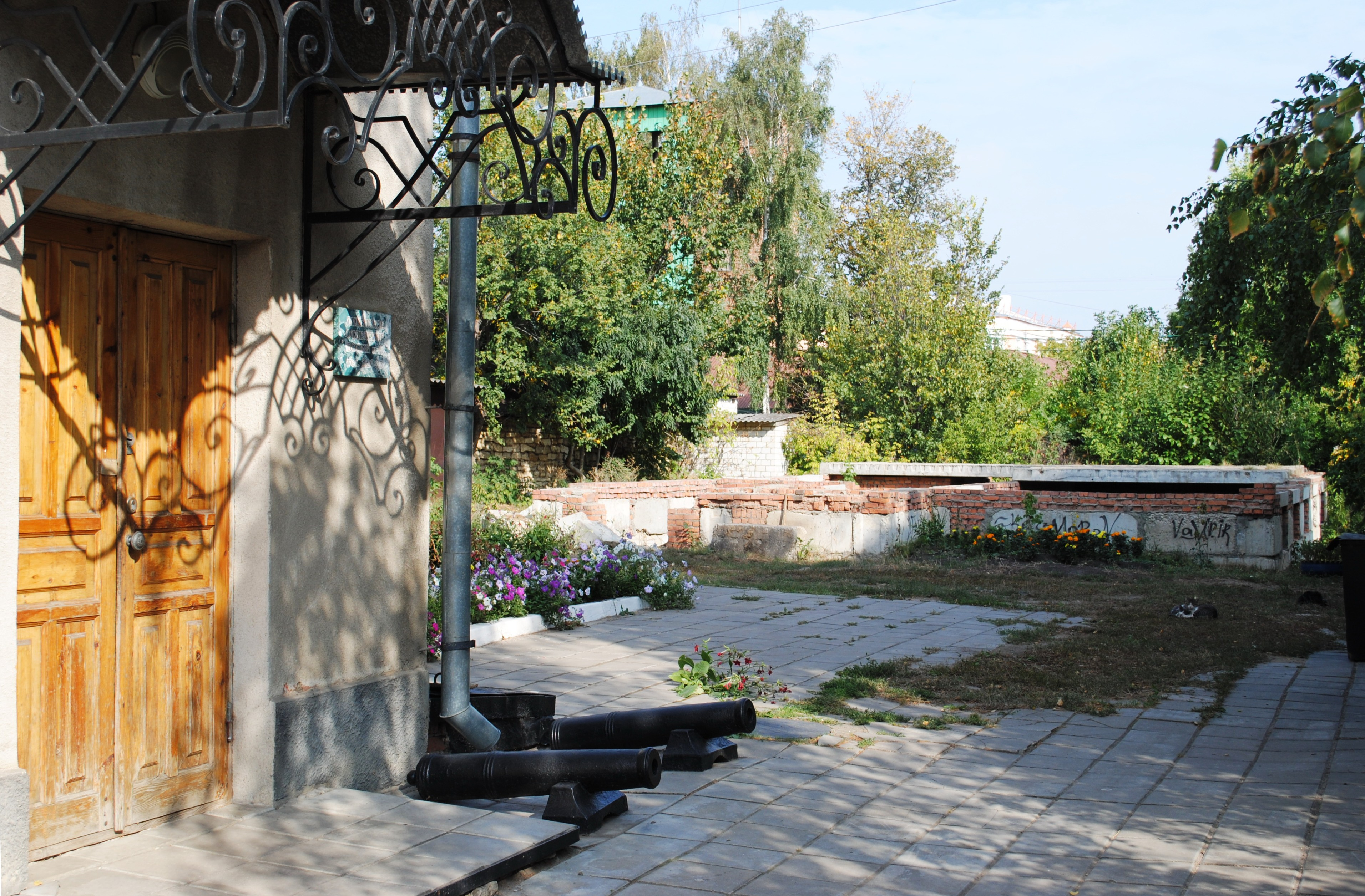 Фундамент будущей галереи